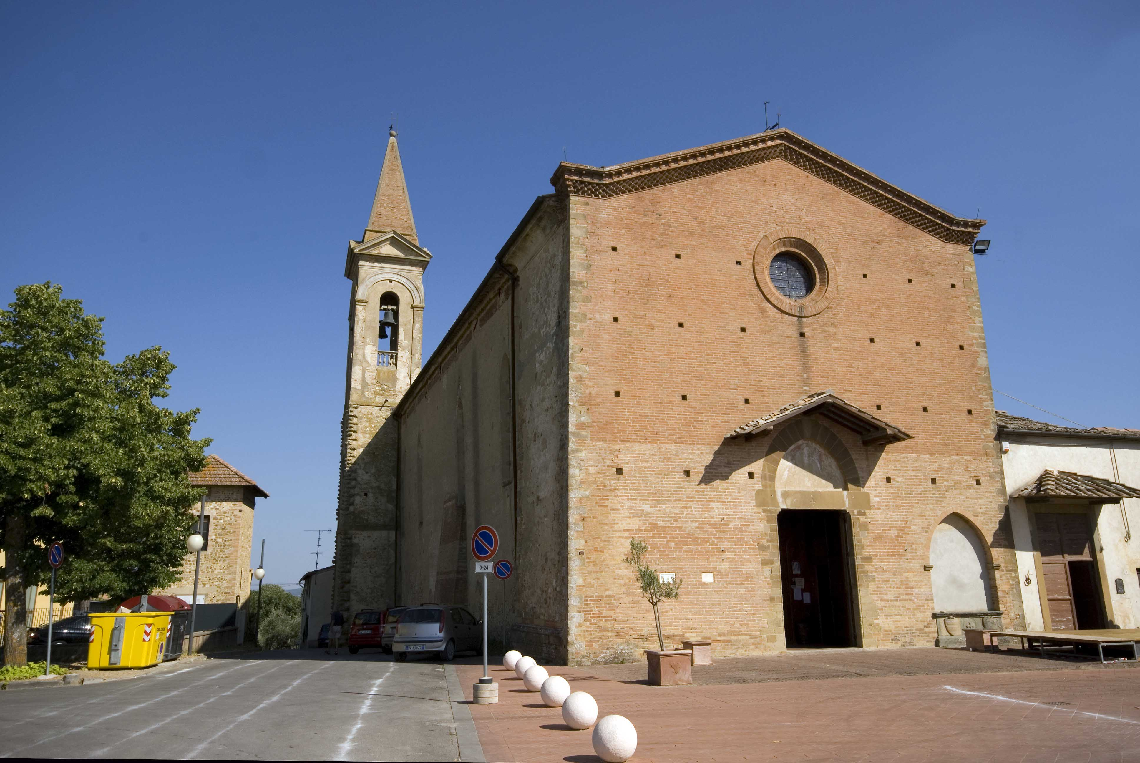 Chiesa di Santa Lucia al Borghetto (Tavarnelle Val di Pesa)